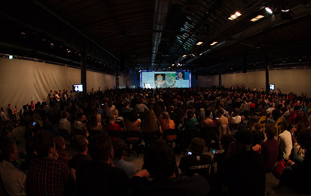 Sascha Lobos talk